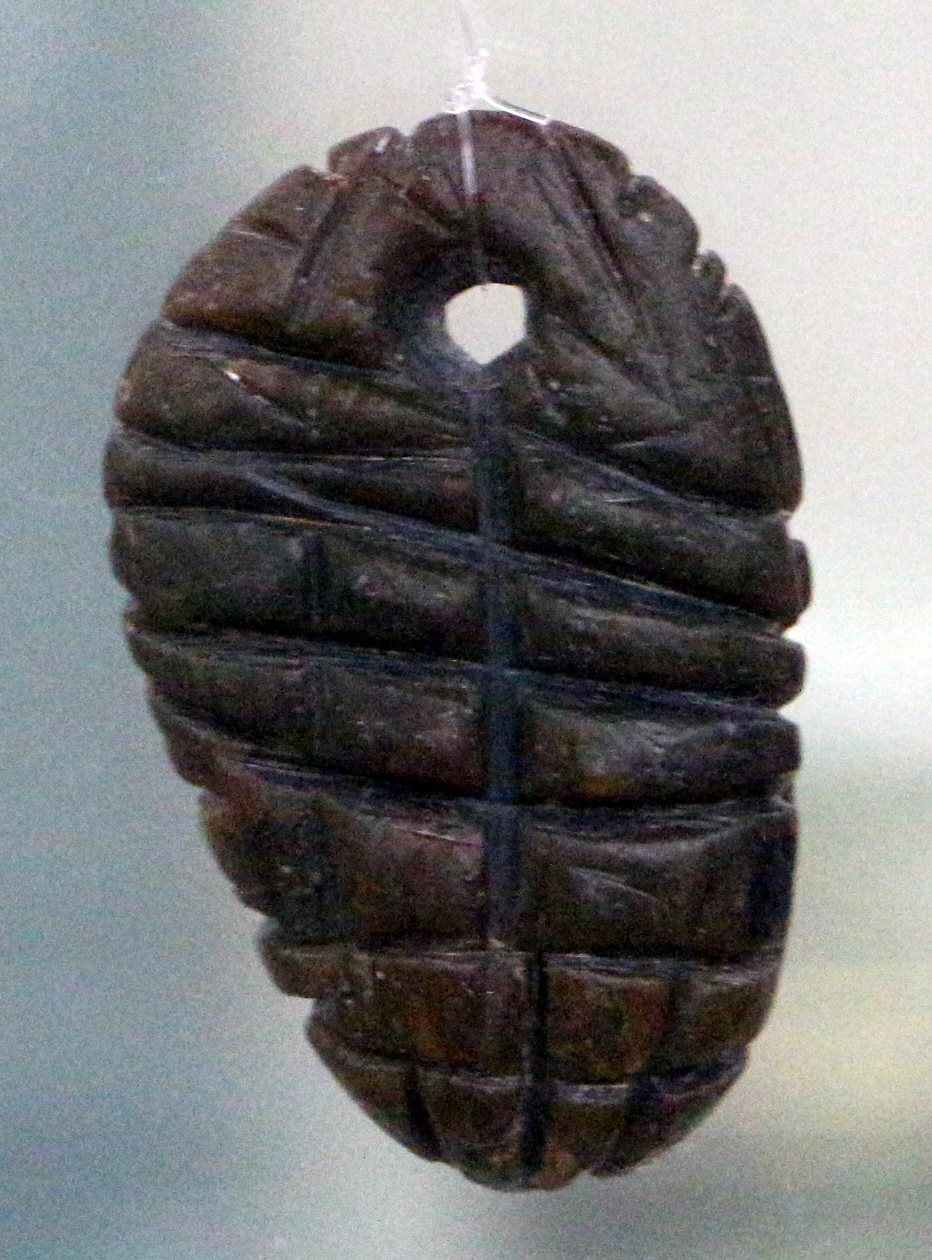 Museo Archeologico (Palazzo del Podestà) This is a photo of a monument which is part of cultural heritage of Italy.